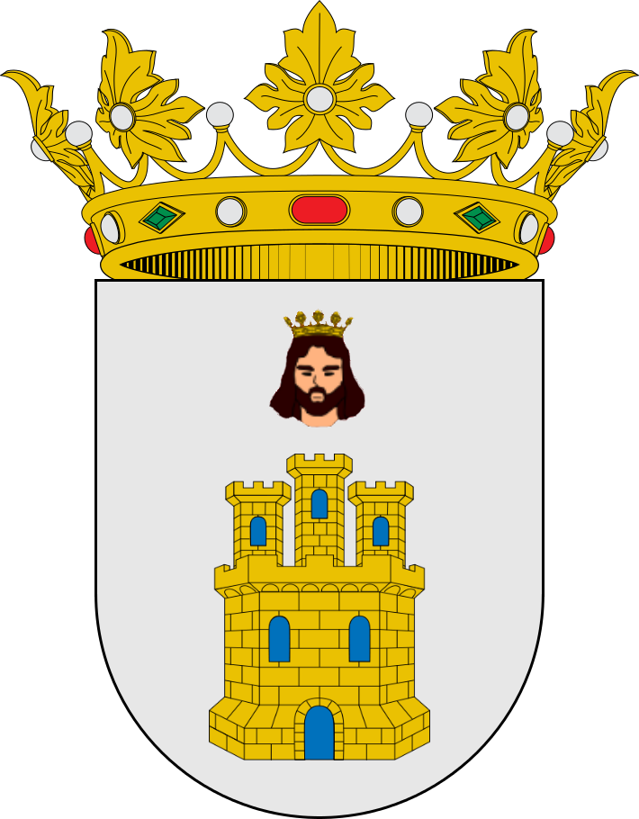 Escudo de Rebollo de Duero: En campo de plata, castillo de oro y un busto de rey. Timbrado con corona real abierta.